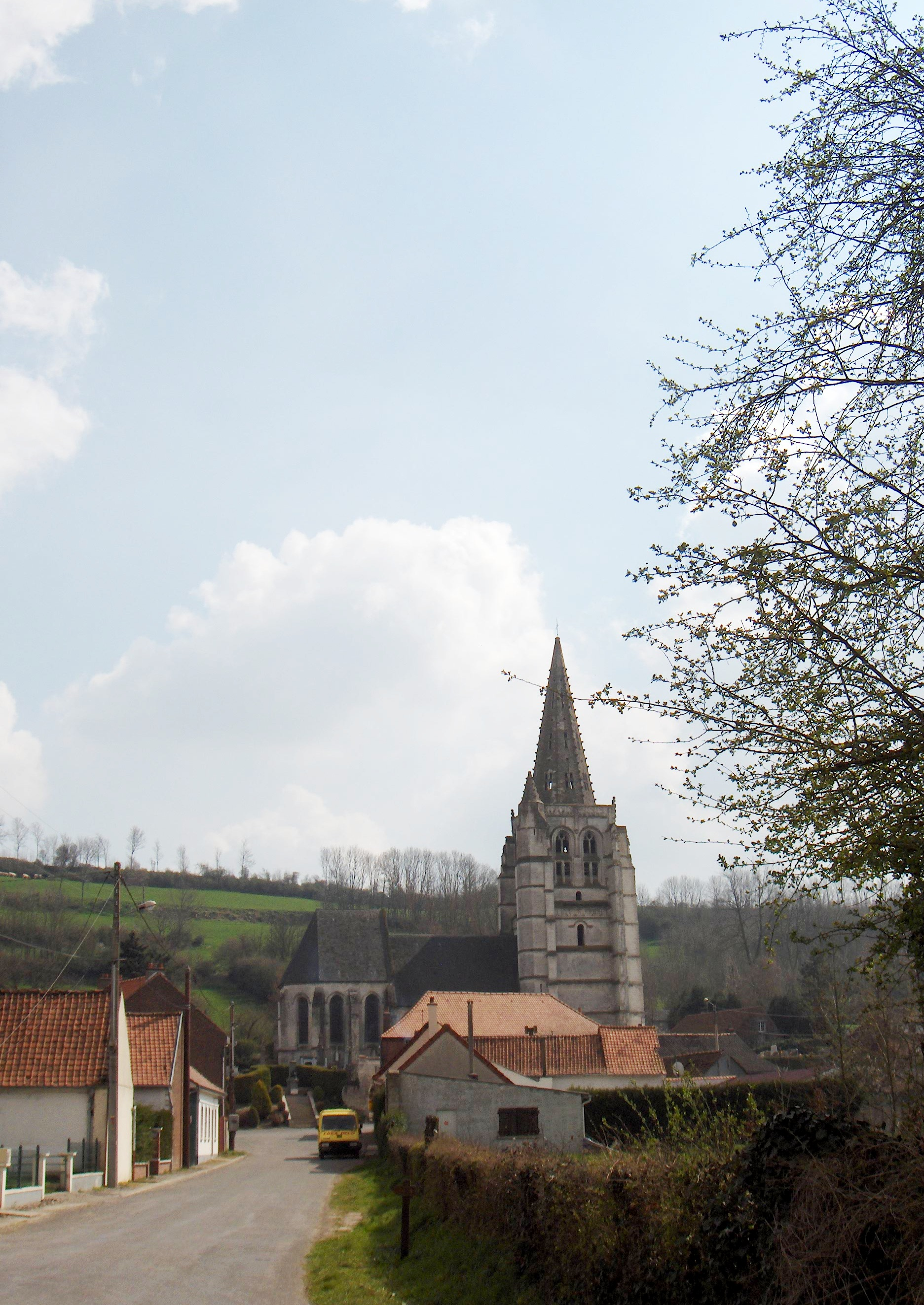 Merck-Saint-Liévin (Frankreich, Dept. Pas-de-Calais), Audomaruskirche (église Saint-Omer), 16. Jh.